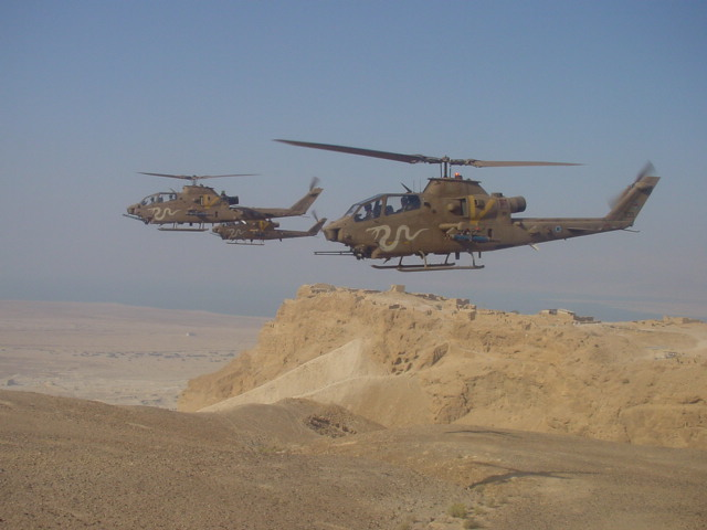 AH-1 Cobra Helicopter gunships of the IAF fly over Masada. מסוקי קוברה ("צפע") של חיל האוויר הישראלי טסים מעל מצדה.